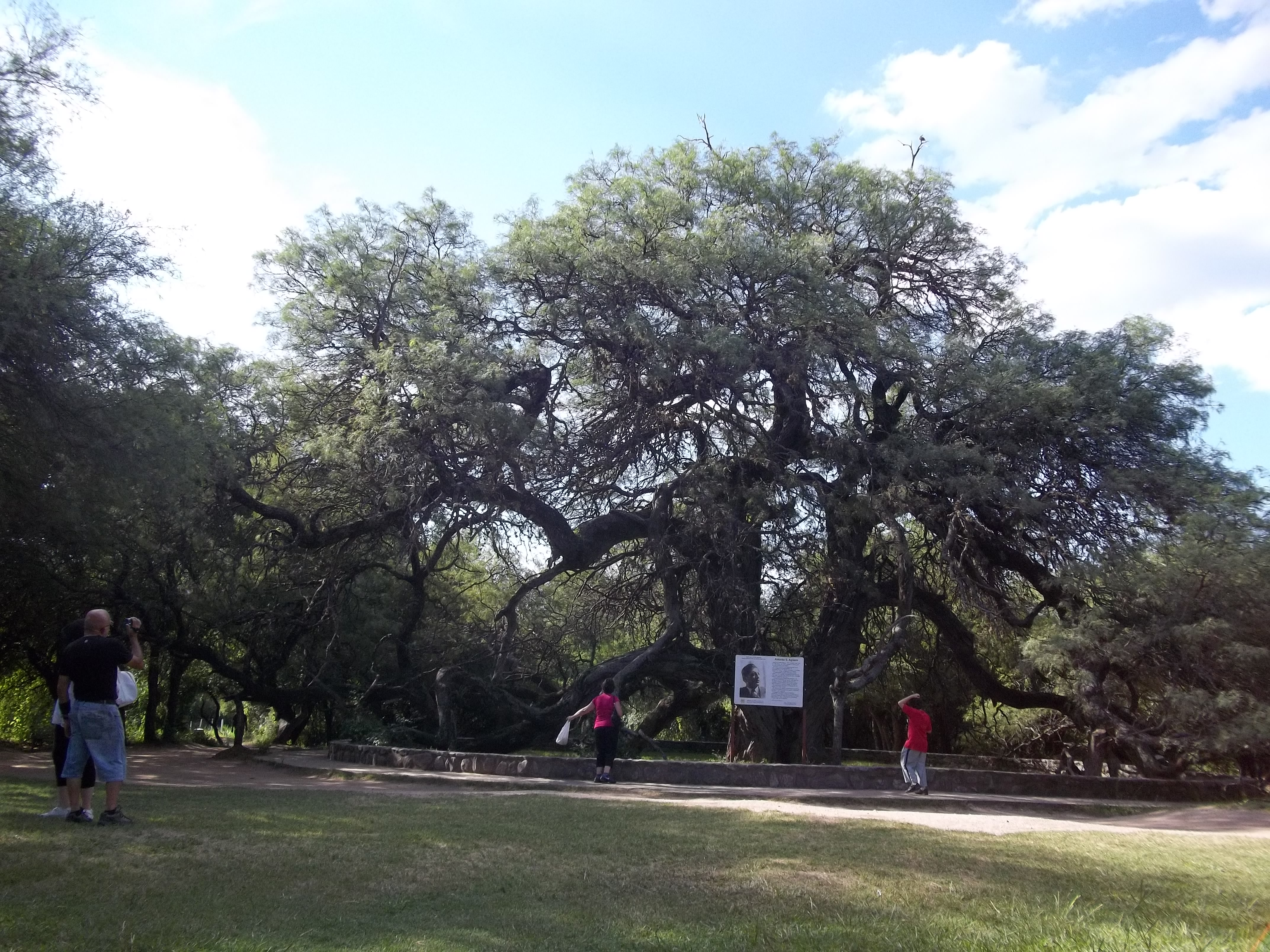 El Algarrobo Abuelo, en Merlo, San Luis, Argentina